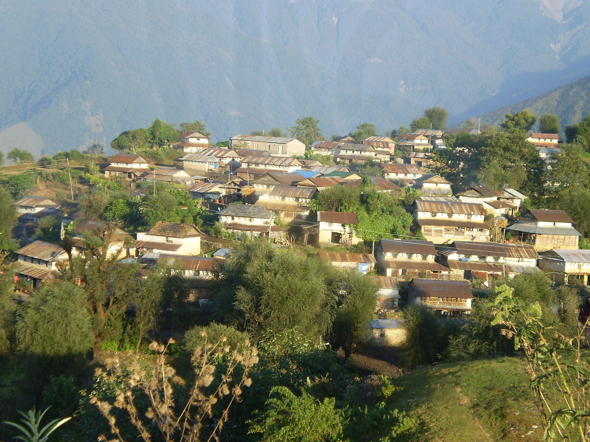 नेपाली: घलेगाउँ